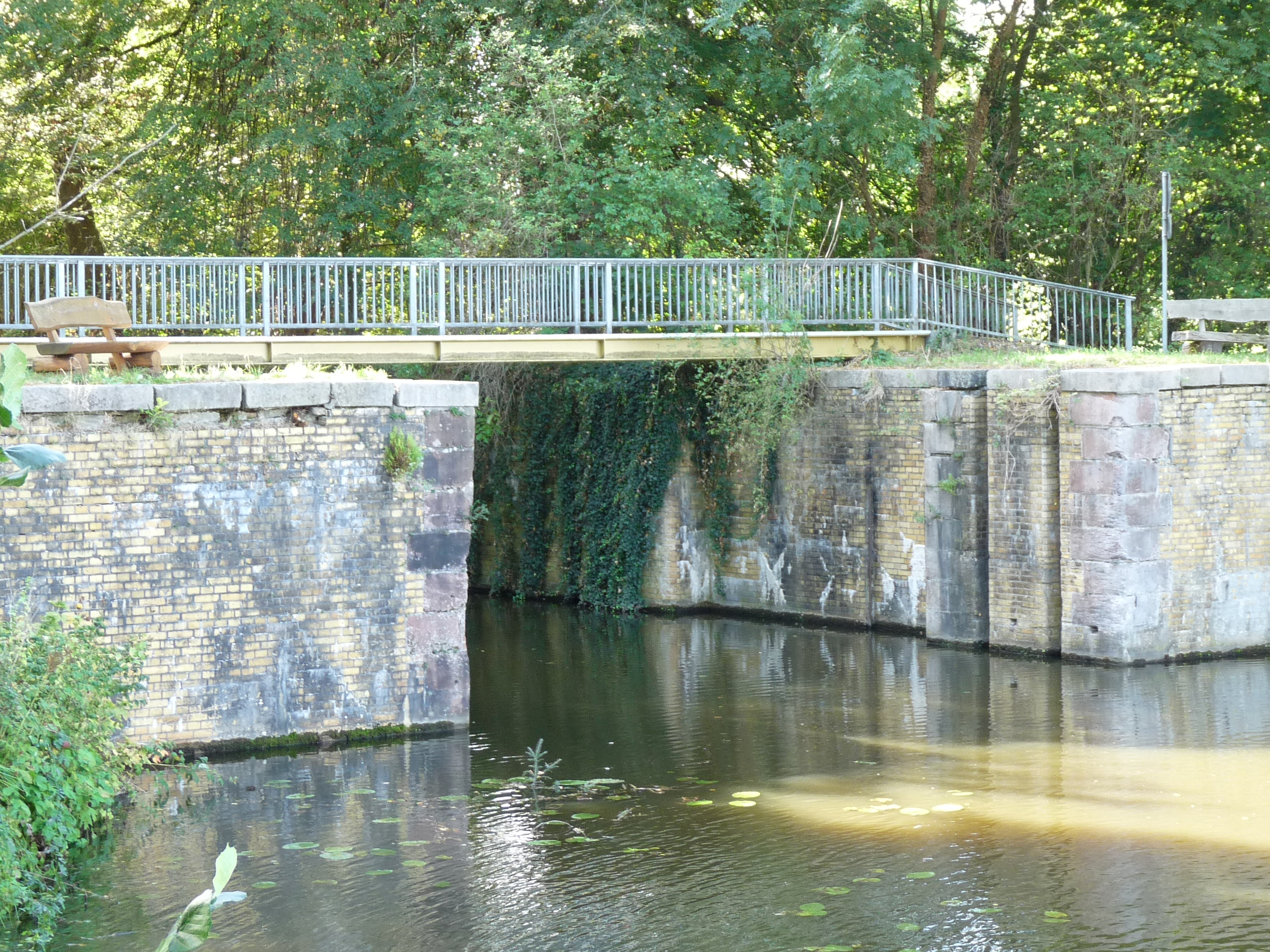 Westlich am Ortsrand von Bergzow befindet sich die gut erhaltene ehemalige Schleuse Bergzow des früheren Ihlekanals. Die Schleuse hatte eine nutzbare Länge von 47 Meter und ist 8 Meter breit. Die Fallhöhe betrug 2,70 Meter. Bergzow ist ein Ortsteil der Einheitsgemeinde Elbe-Parey im Landkreis Jerichower Land in Sachsen-Anhalt.